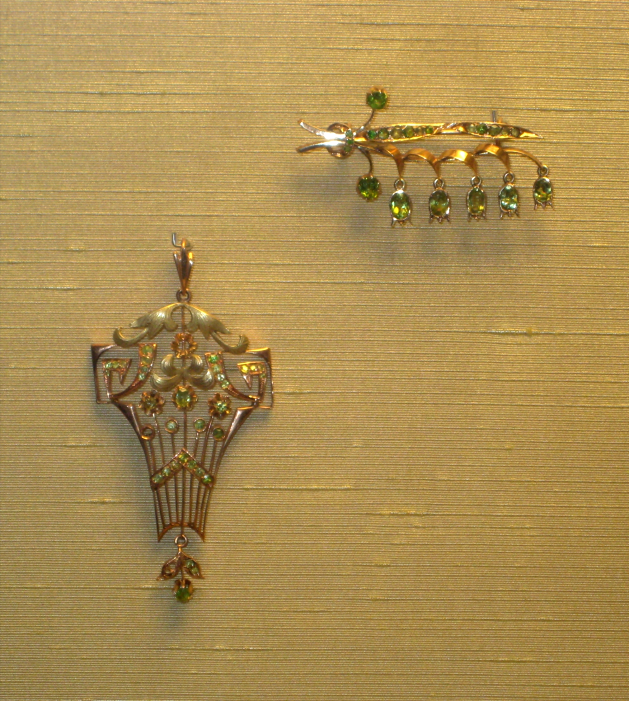 1. Подвеска. Москва, 1908-17. Демантоиды, золото. Музей истории камнерезного и ювелирного искусства. 2. Брошь. Екатеринбург, 1908-17. Мастер-монограммист СТ. Демантоиды, золото. Музей истории камнерезного и ювелирного искусства.